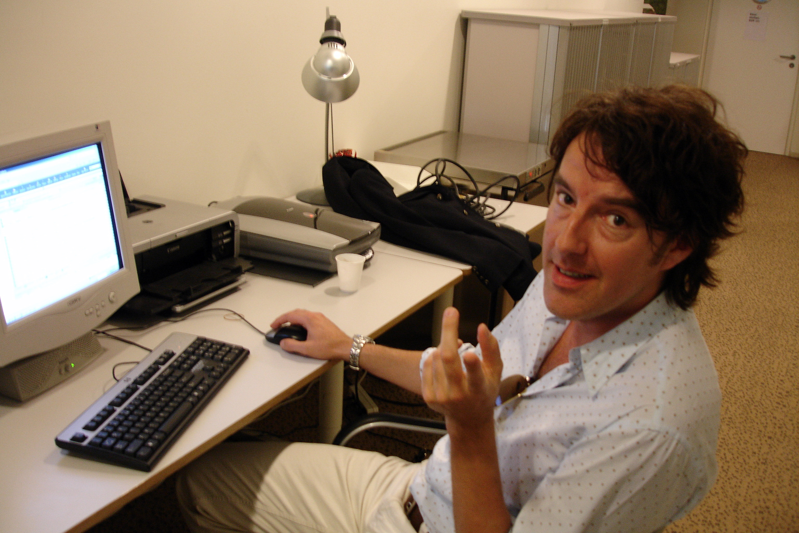 Michiel Borstlap, Nederlands componist, schrijver, producer, pianist